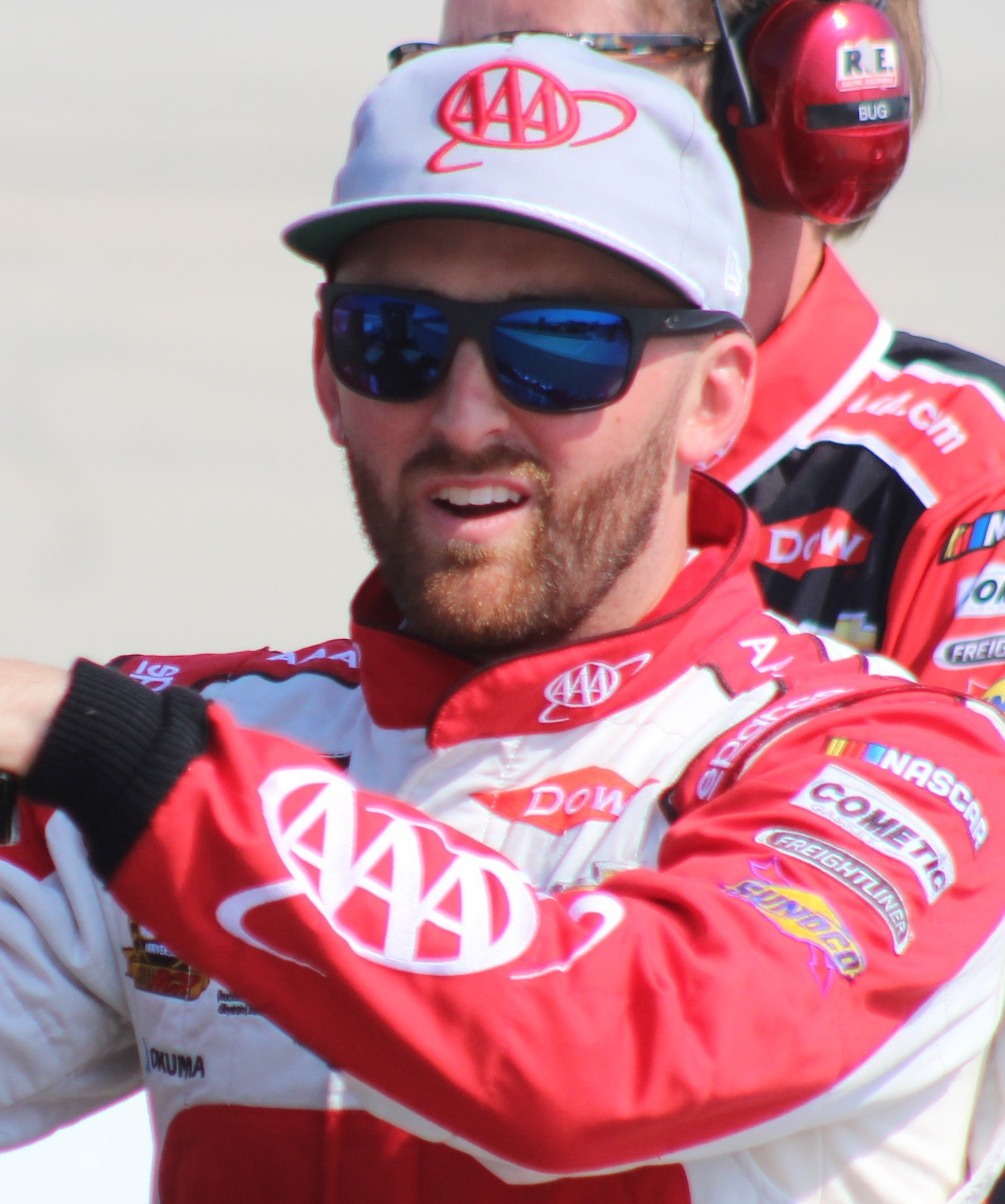 2019 Gander RV 400